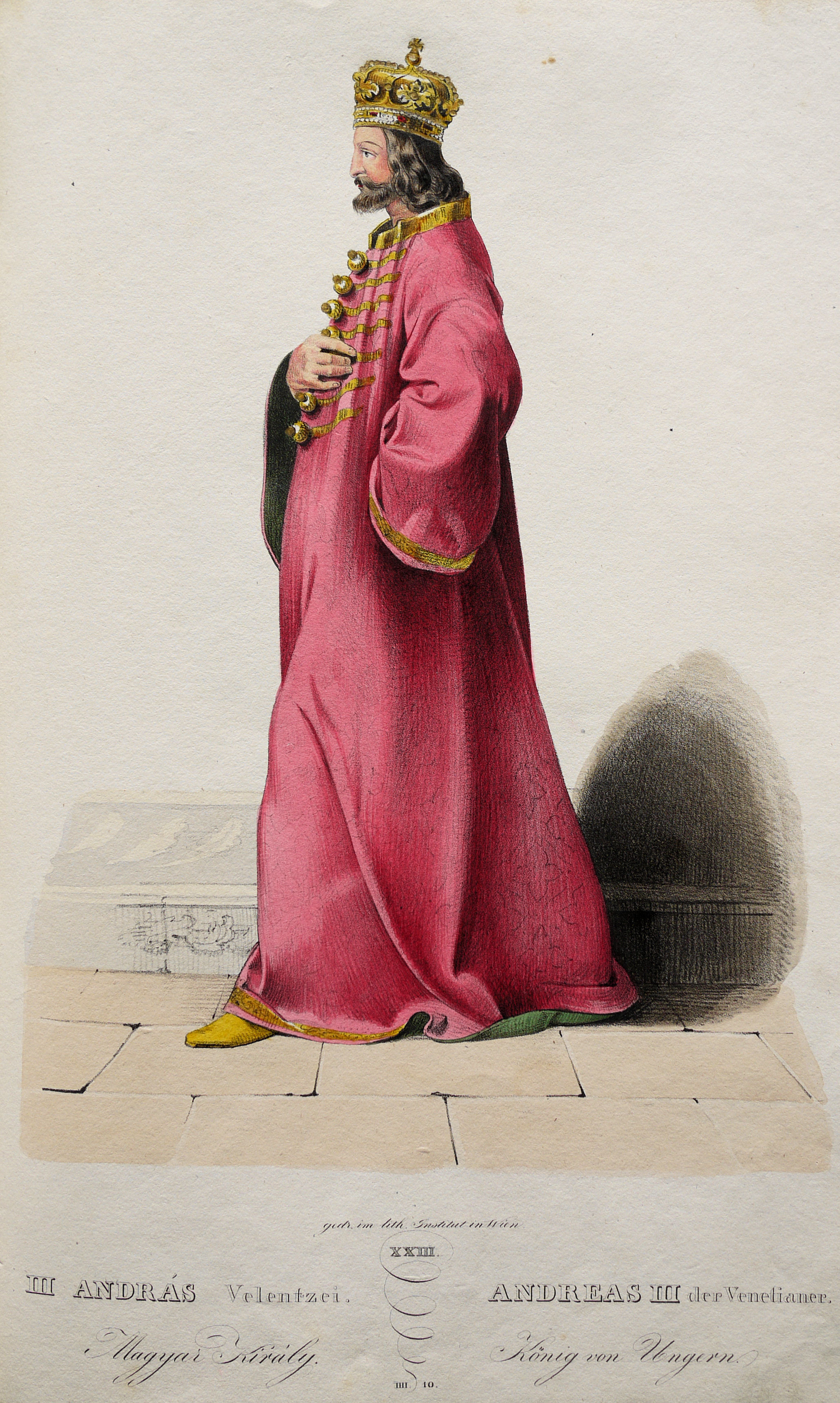 Andreas III. (1265-1301), König von Ungarn etc.; Lithographie von Josef Kriehuber nach einer Zeichnung von Moritz von Schwind aus Ungerns Erste Heerführer Herzoge und Koenige In einer Reihe von Bildnissen von Bela bis auf Seine Majestät Franz I. Kaiser Von Österreich König Von Ungern &c., &c. Wien : Lithographisches Institut ;ca. 1828